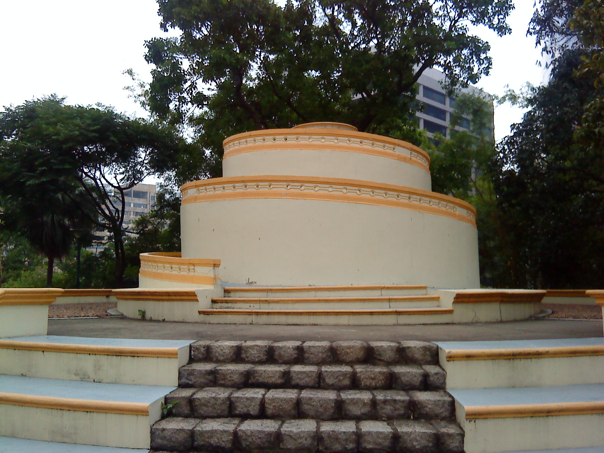 Montanha Russa